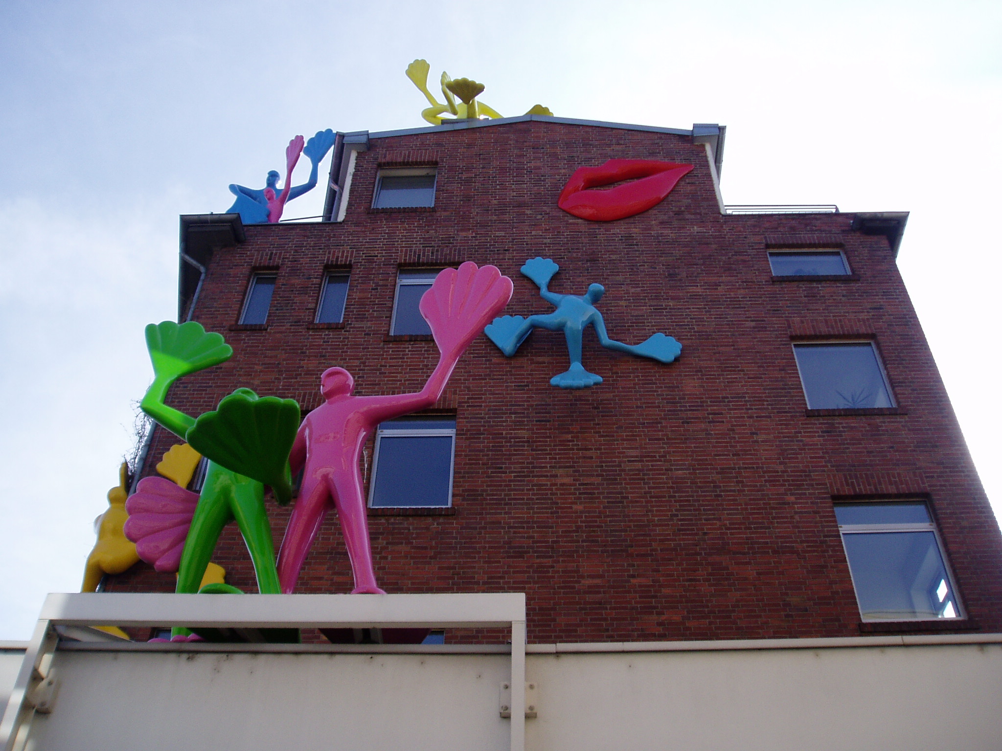 Köln-Zollstock, Flossis am Gebäude der UNICEF, Köln